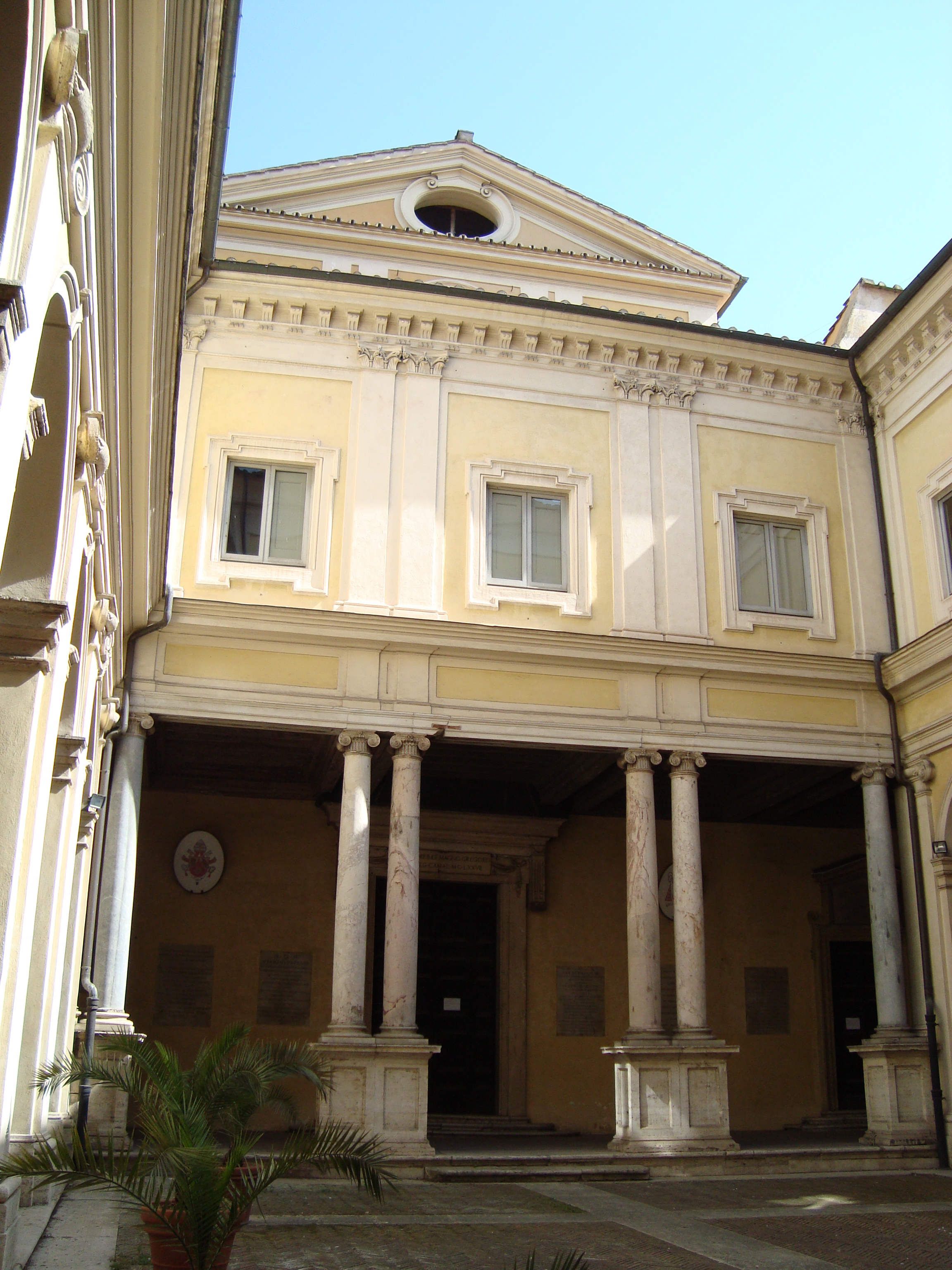 Patio de l'eglise San Gregorio al Celio